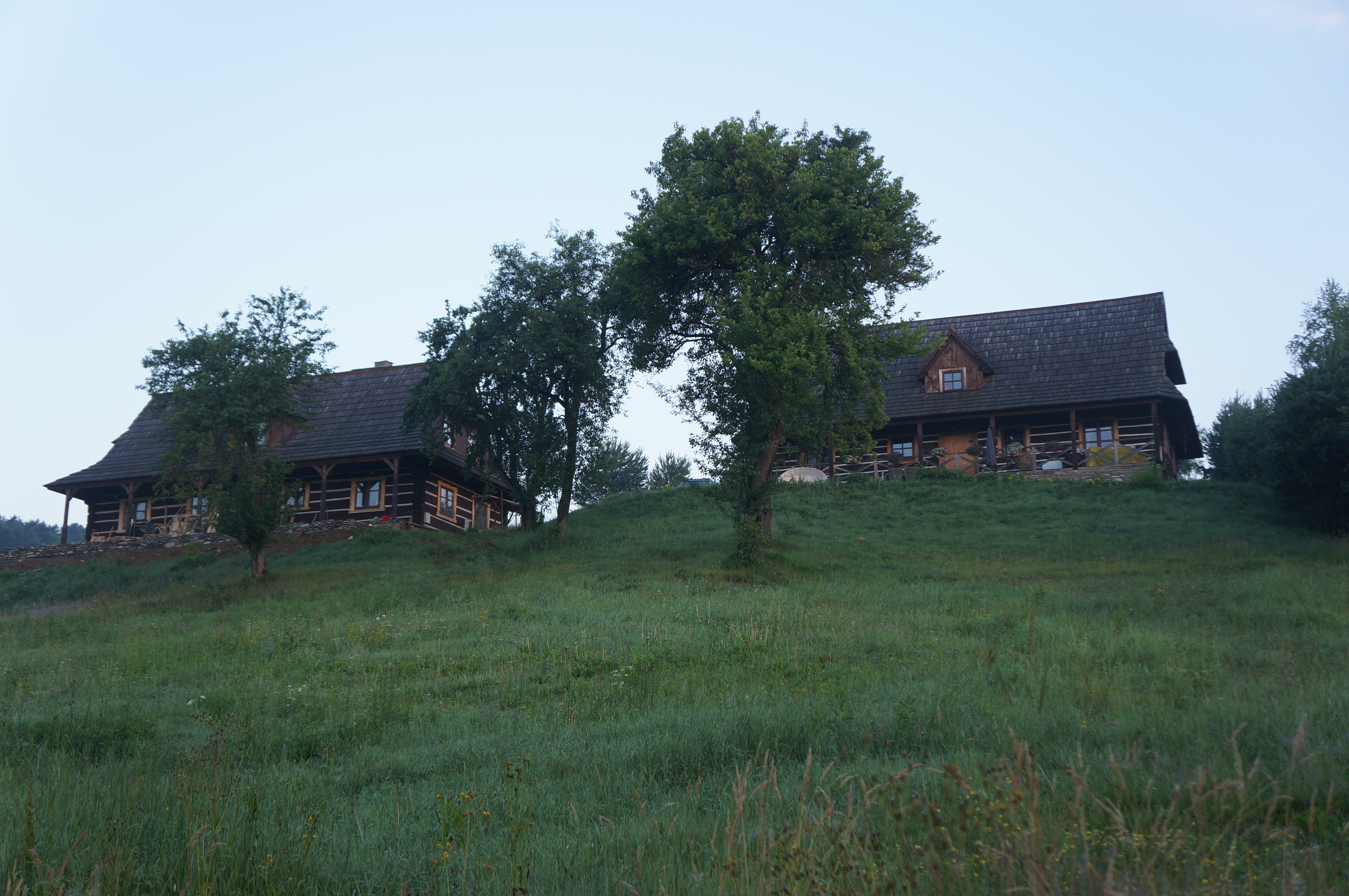 Zahoczewie - drewniane domy